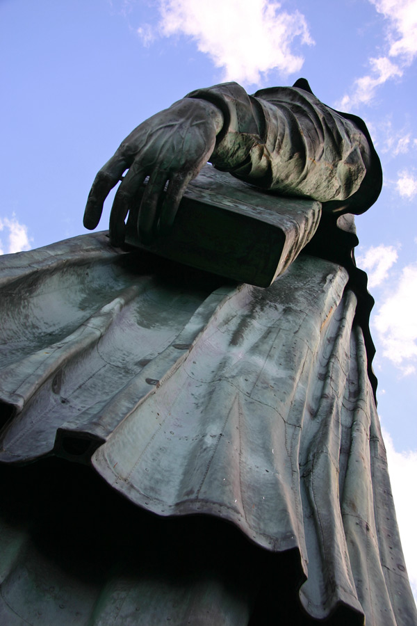 Colosso di San Carlo Borromeo ad Arona (NO), dettaglio della veste e del braccio sinistro visti dal basso.